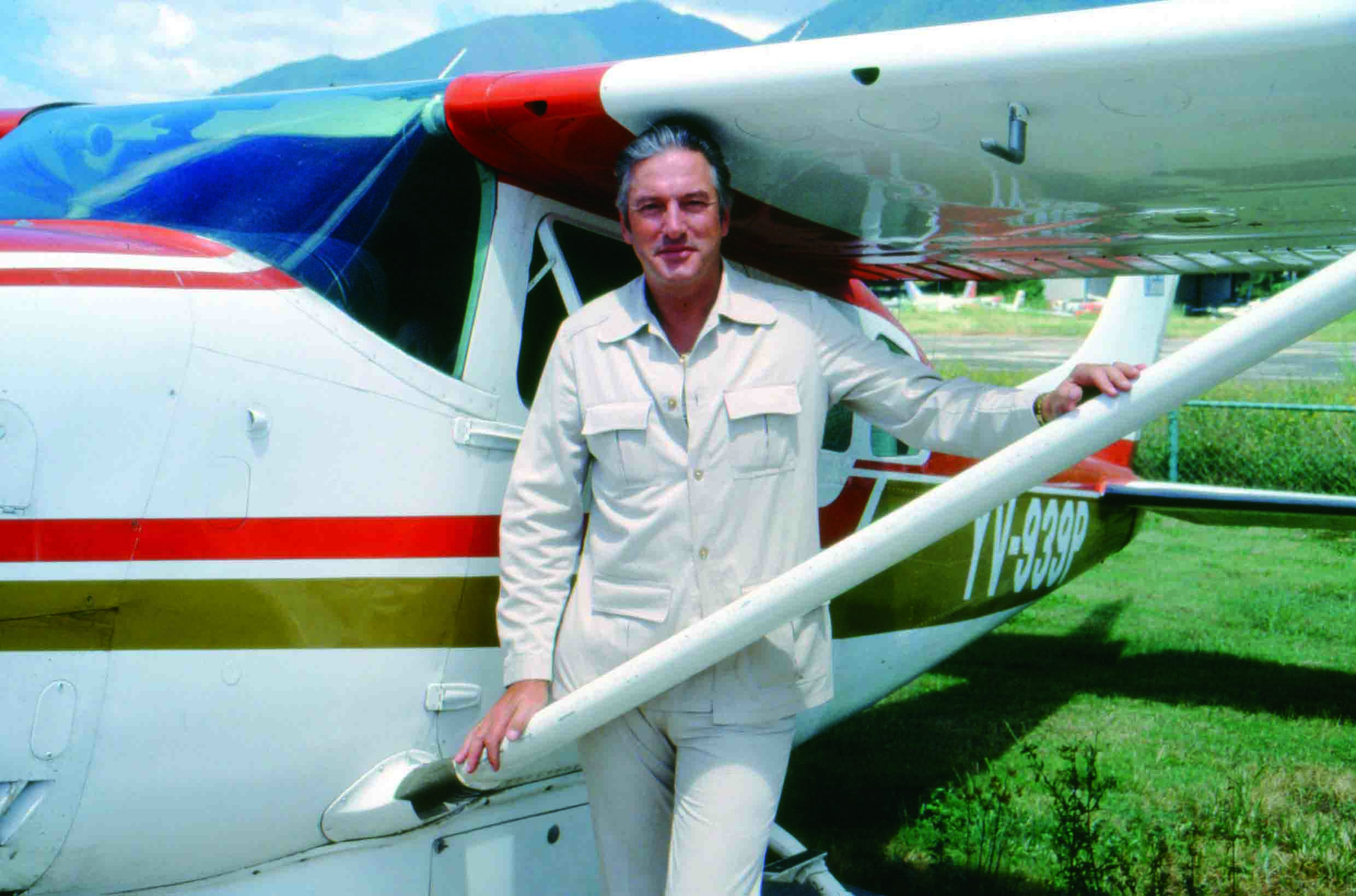 Pedro Trebbau a finales de la década de 1970.